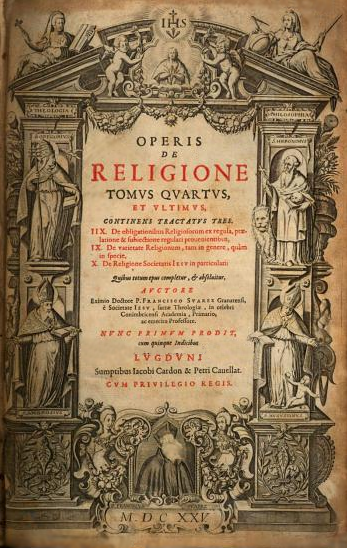 Portada del libro Operis de religione (tomo IV). Publicado en latín por Francisco Suárez en Lyon, edición de 1625.